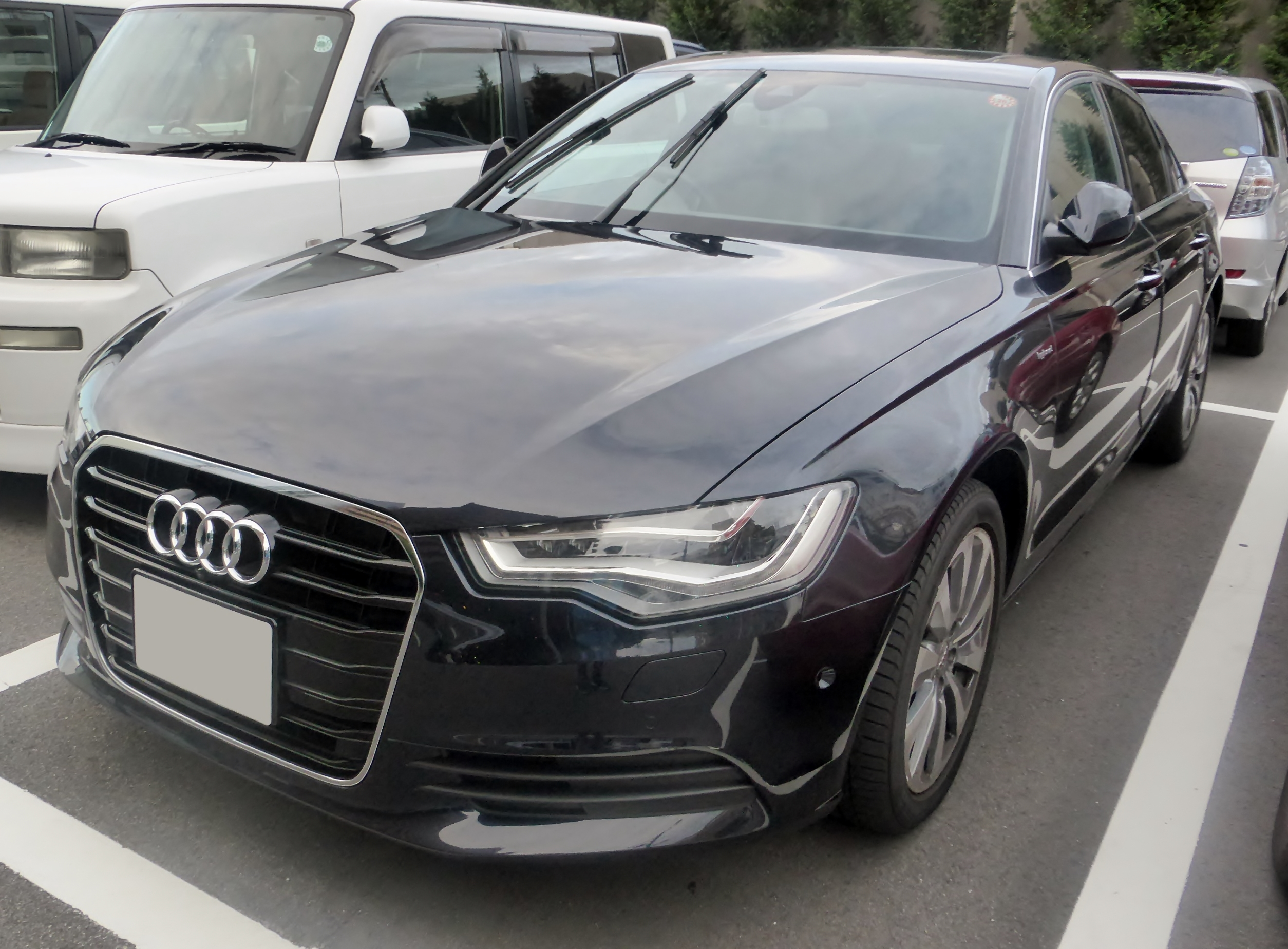 C7型アウディ・A6ハイブリッドをフロントから撮影。